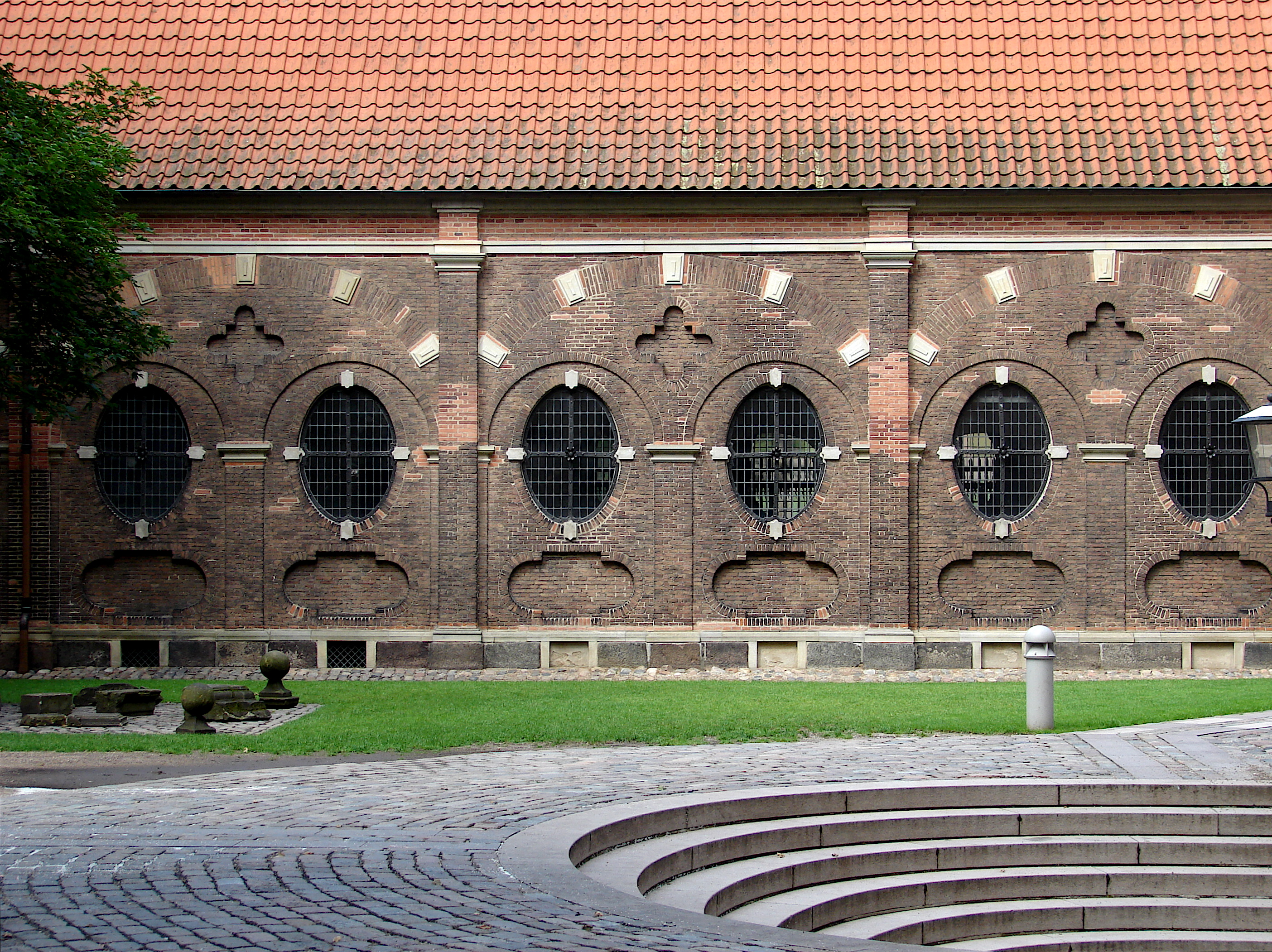 Gravkapel, St. Petri kirke, København, Hans van Steenwinckel den yngste